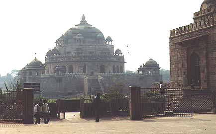 Mausolée de Sher Shah Suri à Sasaram